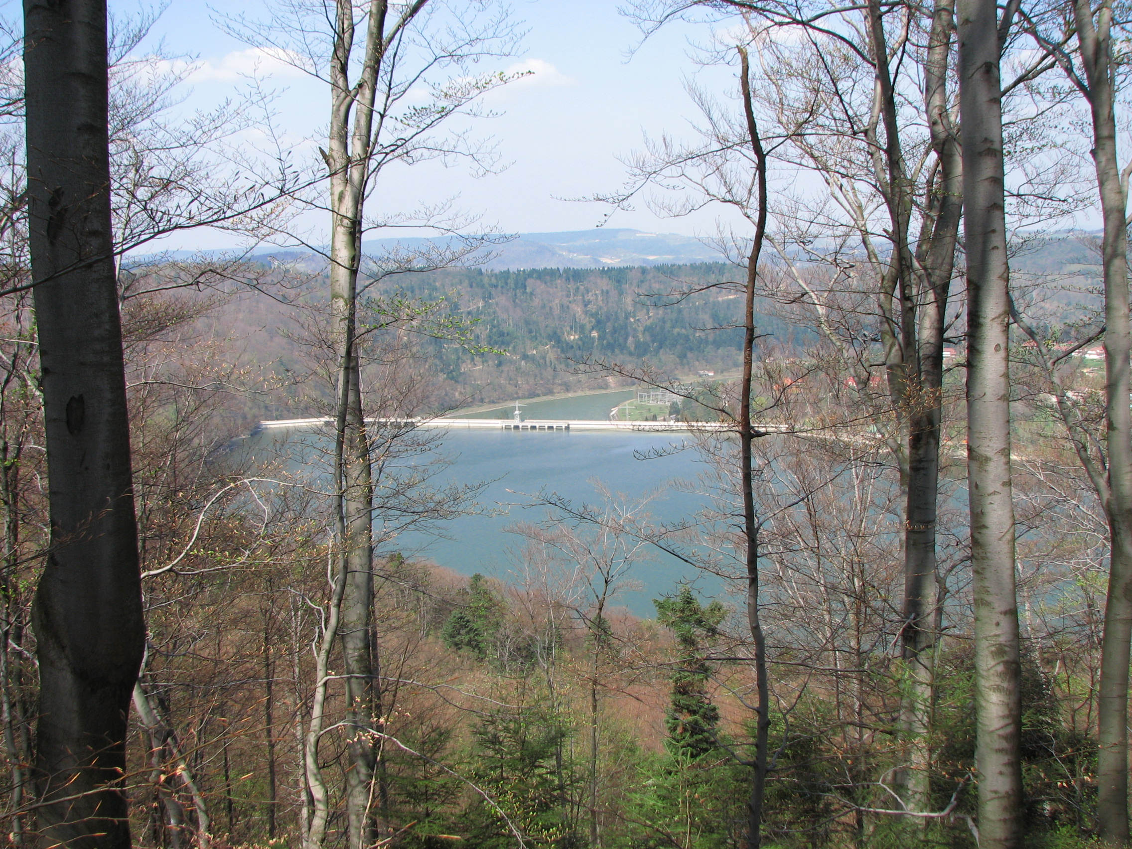 Zapora wodna w Roznowie, widok z zalesionej Ostrej Góry.